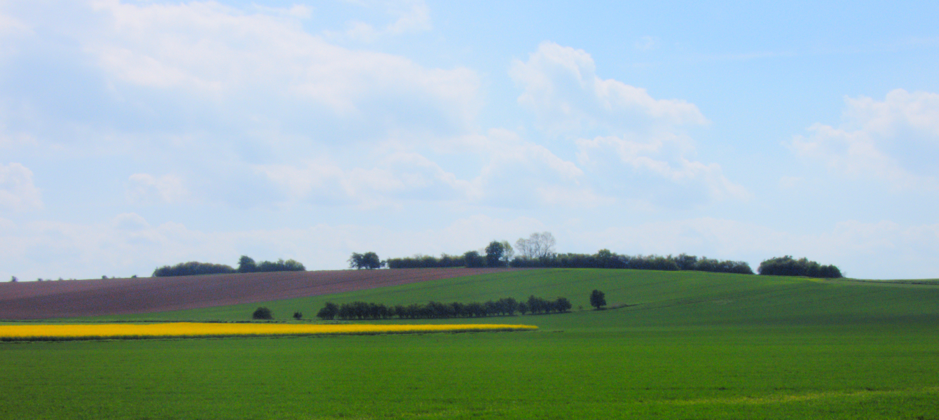 Der Delmer Berg oder auch Delmberg von Nordwest.